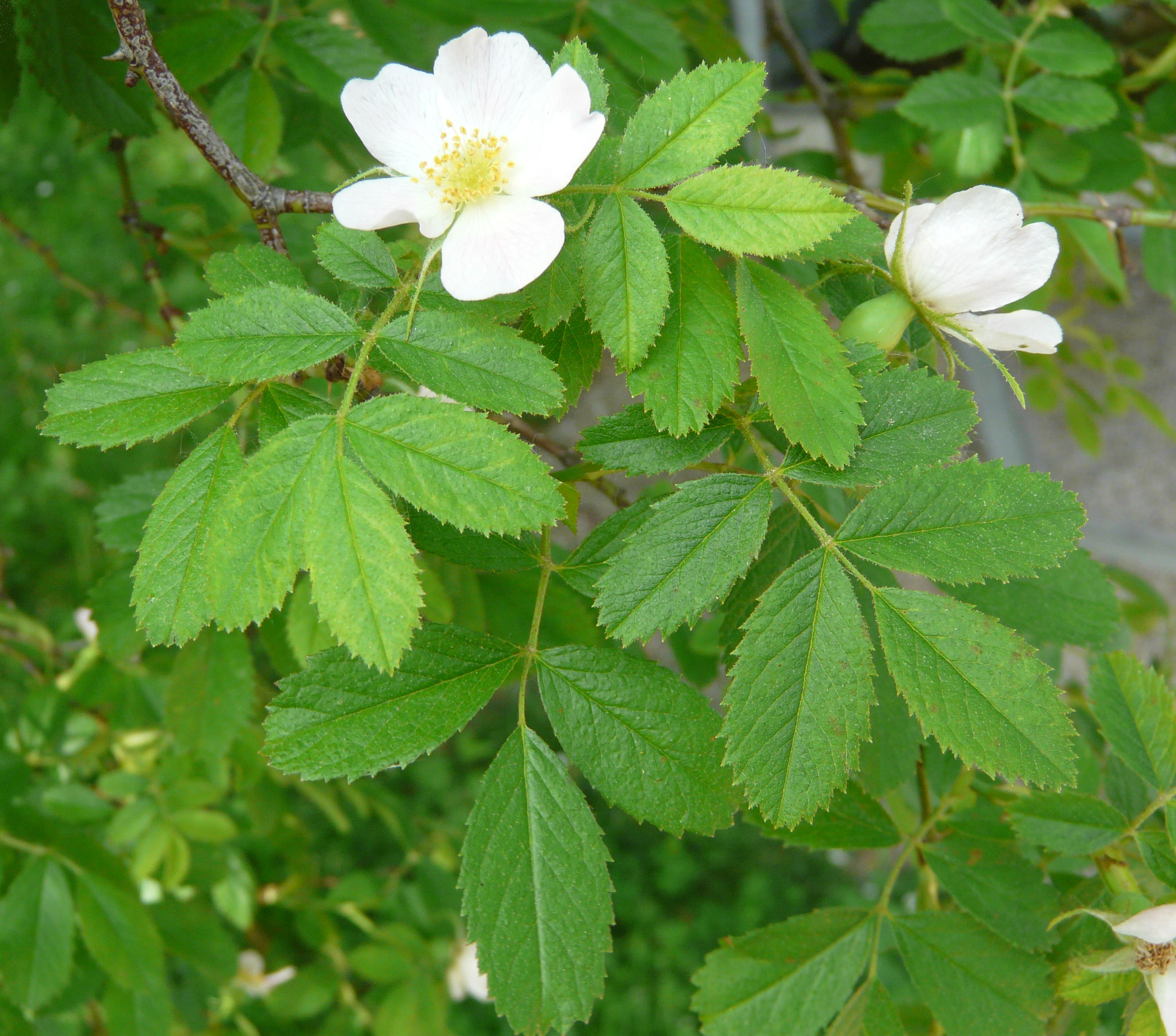 Rosa agrestis